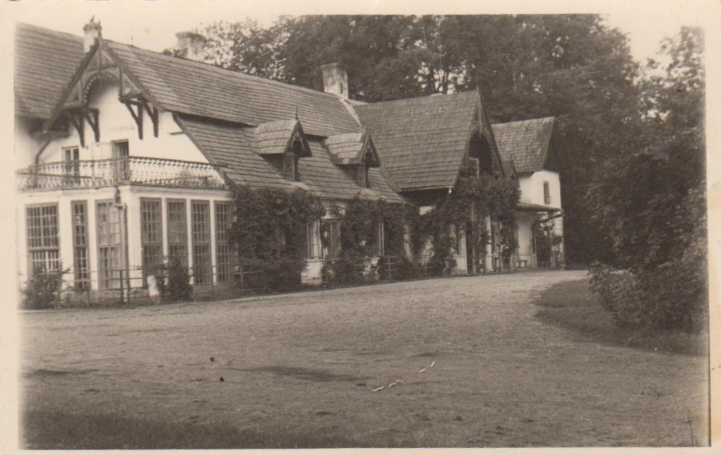 Dwór w Rudzie Malenieckiej, z końca XVIII w.